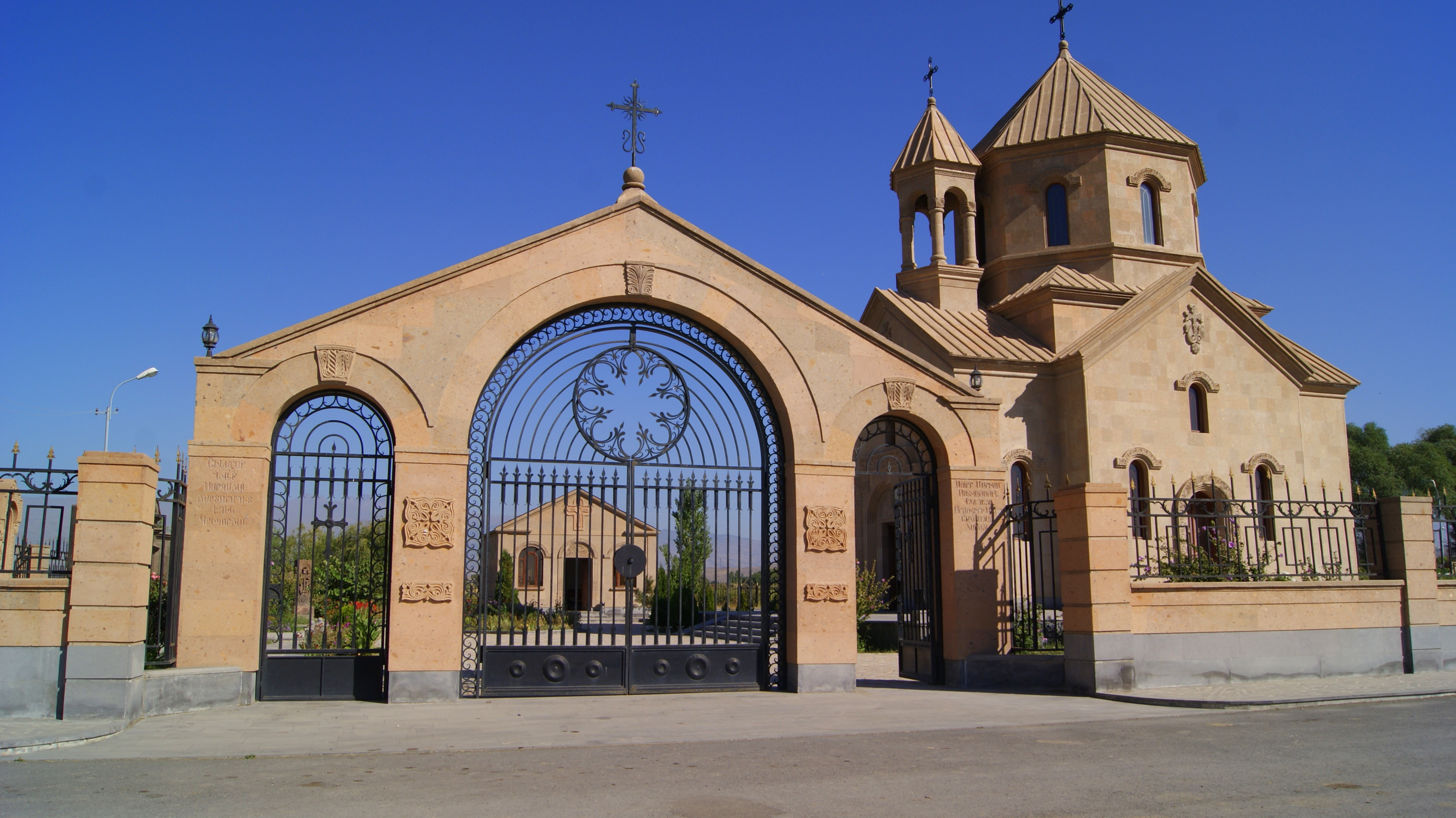 Սուրբ Աստվածածին եկեղեցի (Շահումյան, Արմավիրի մարզ) 77/2